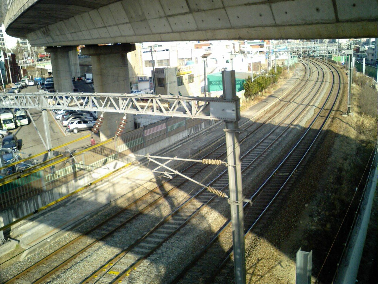 가야선 주례역